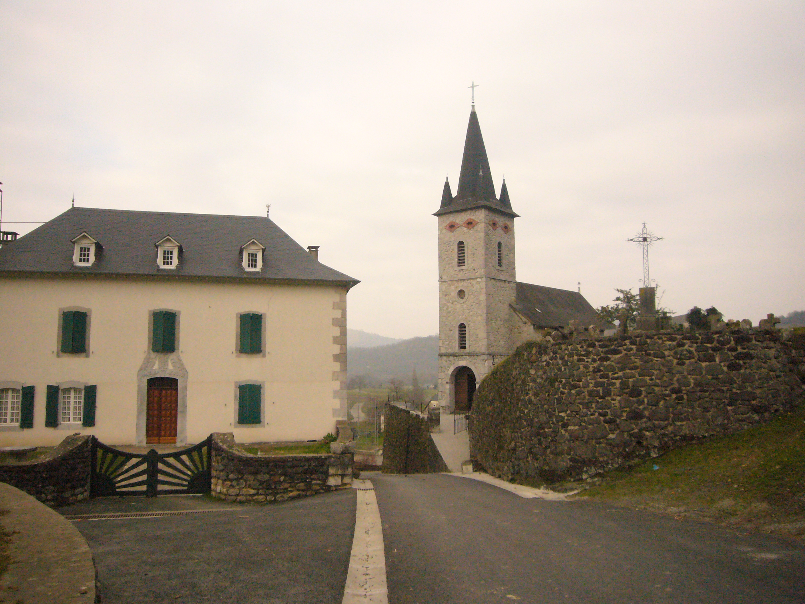 Le village de Lichans (Pyrénées-Atlantiques)